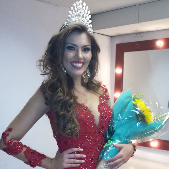 Brazilian model Vitória Bisognin.